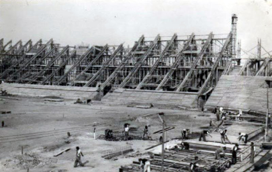 Construcción el Estadio Tomás Adolfo Ducó entre 1940 y 1945.